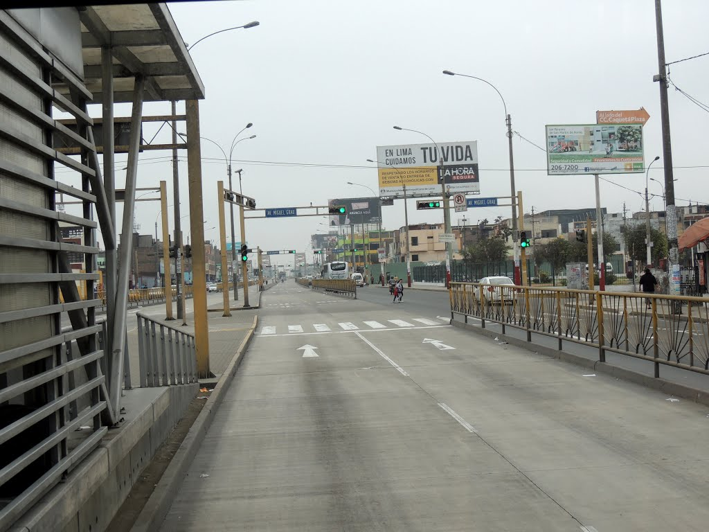 Avenida Caquetá